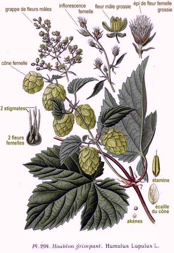 Humulus lupulus L.